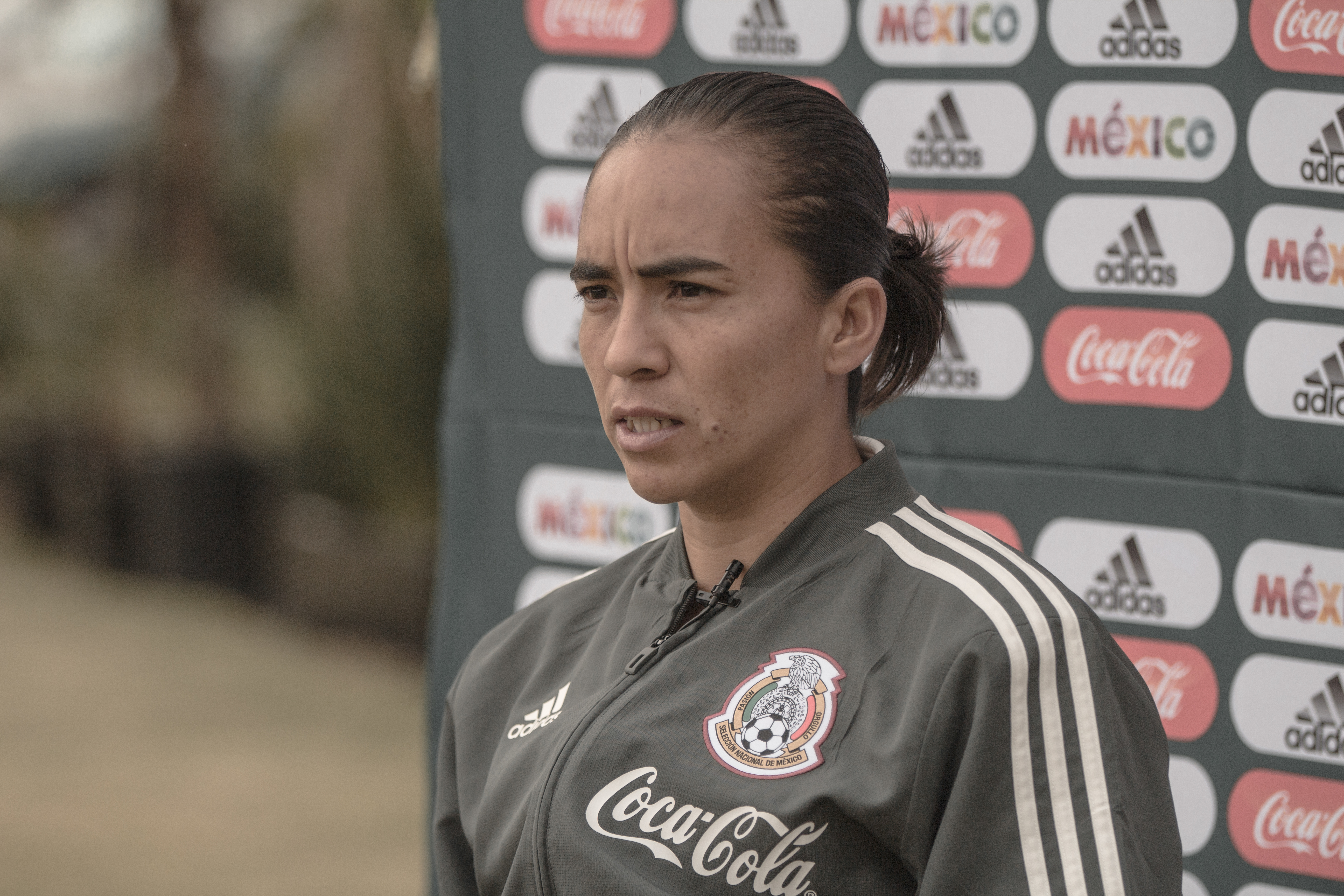 Mónica Ocampo, jugadora de futbol mexicana.